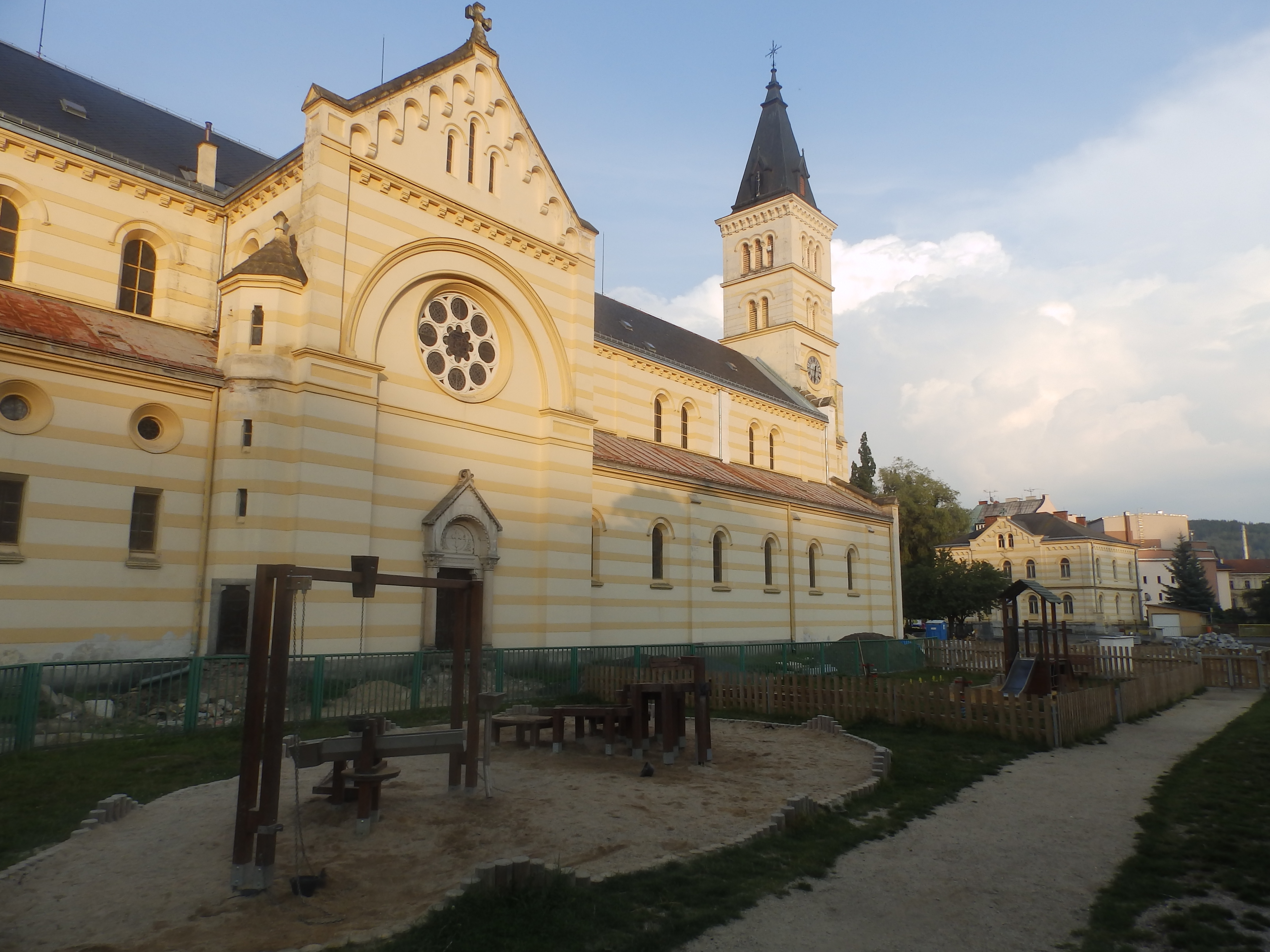 Kostel Nejsvětější svátosti oltářní- Kraslice